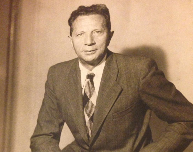 תמונת פורטרט